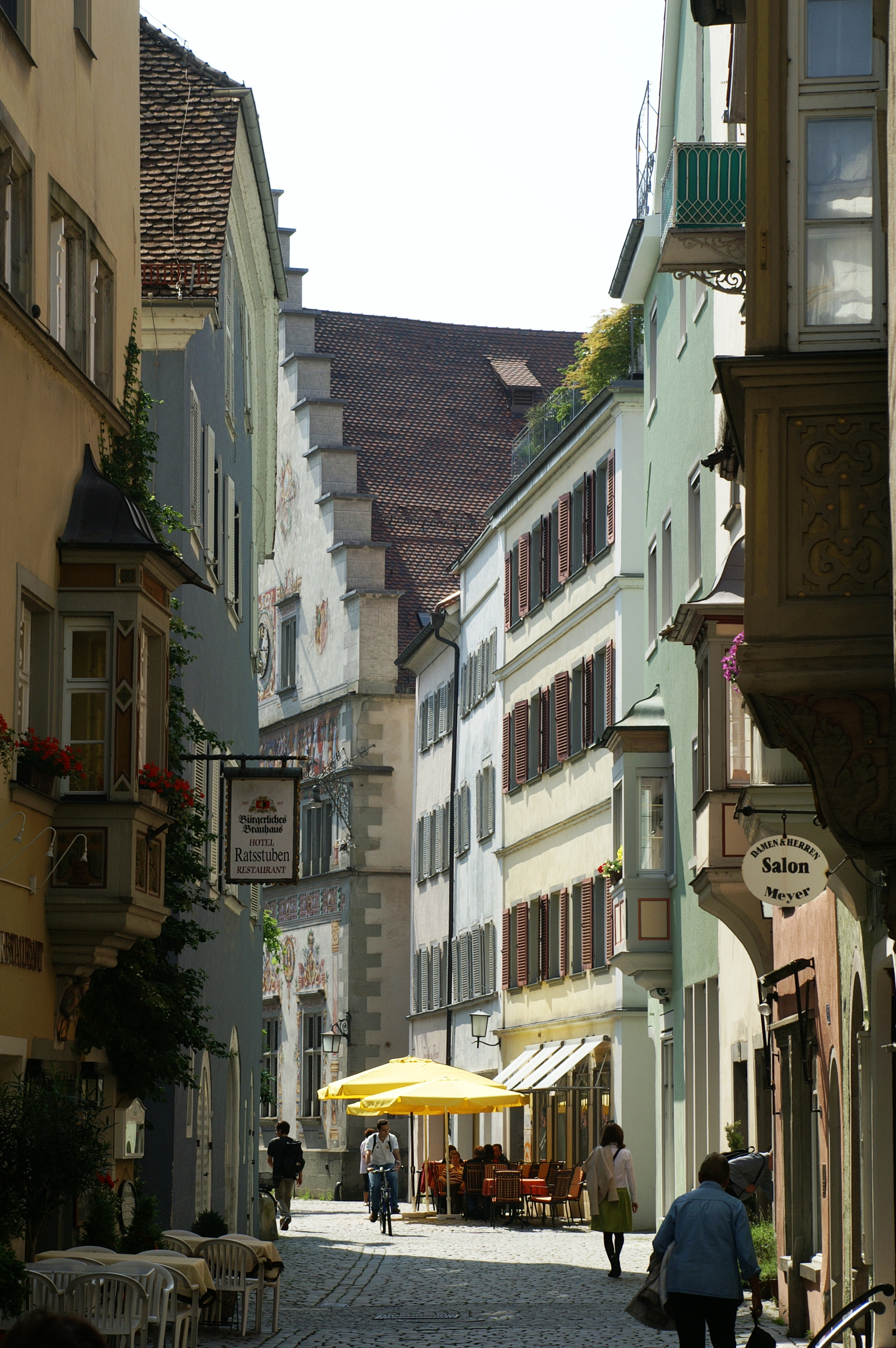 Lindau (Bodensee)